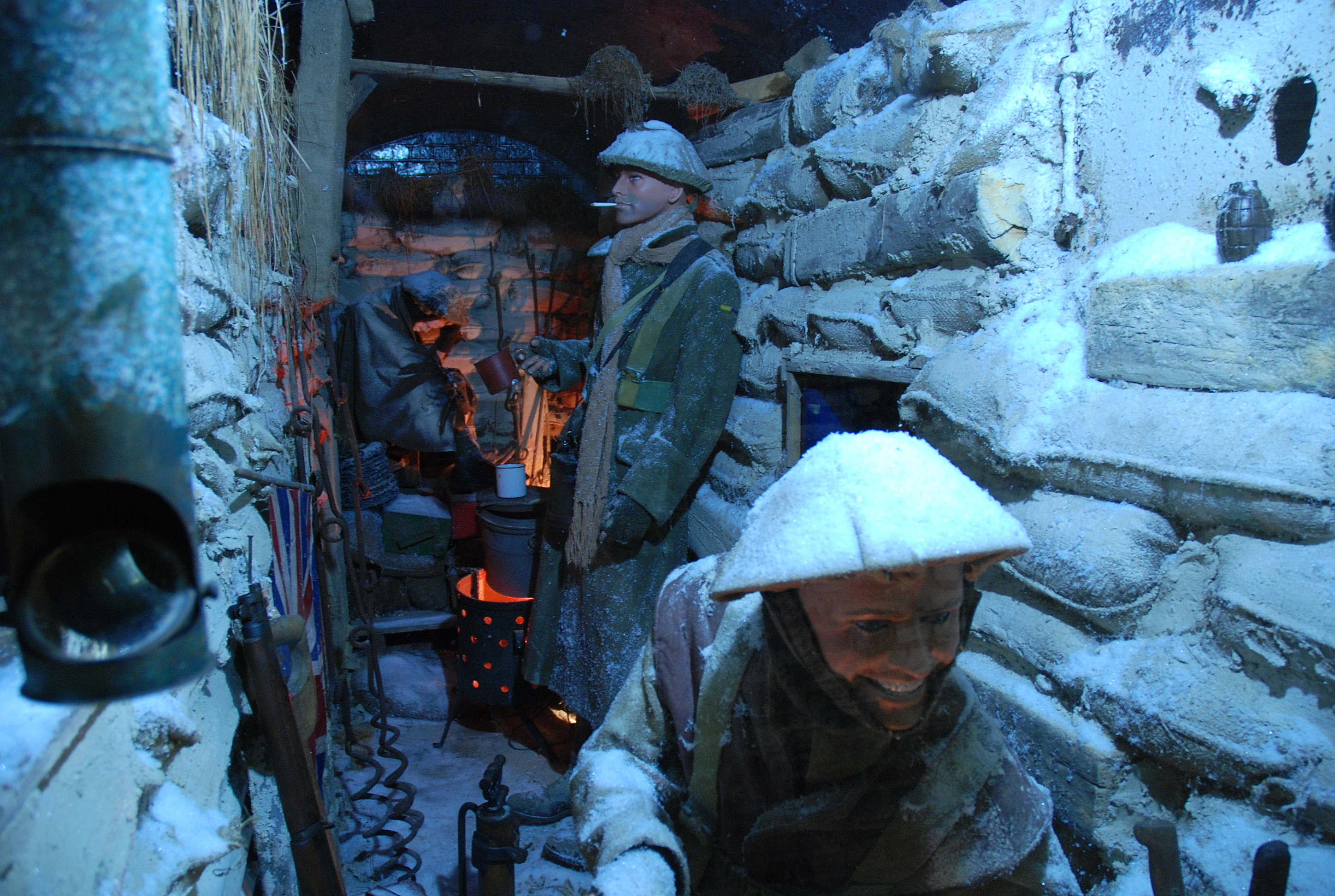 het Museum Somme 1916 in Albert, Frankrijk